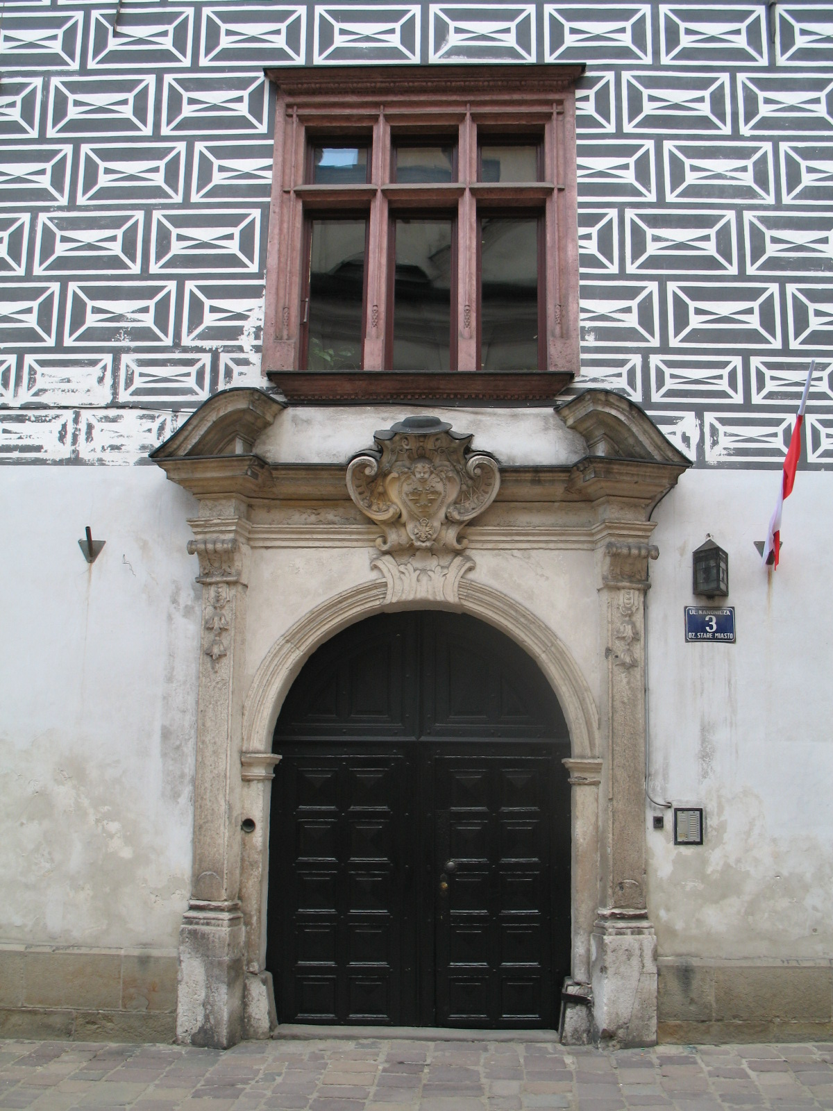 Portal kamienicy przy ul. Kanoniczej 3 w Krakowie; Portal of no. 3 Kanonicza Street, Kraków